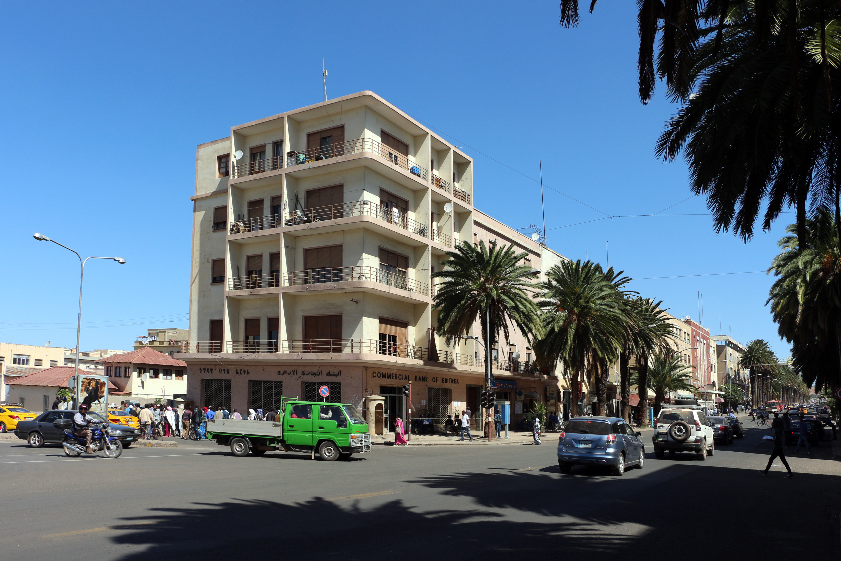 Asmara, cinema impero, 01.JPG